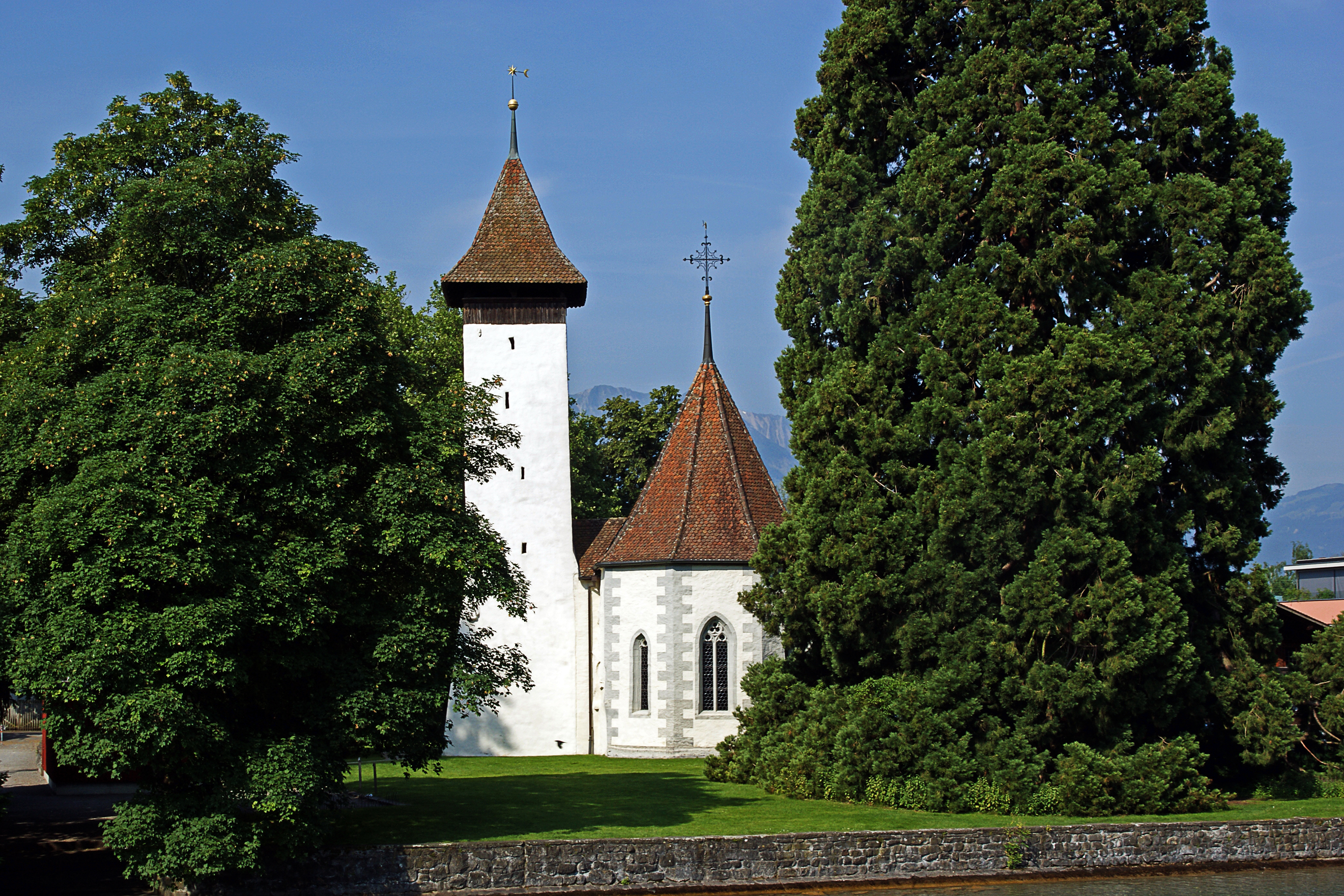 Reformierte Kirche Scherzligen, Thun, vom Schiff aus aufgenommen im Kanal zum See